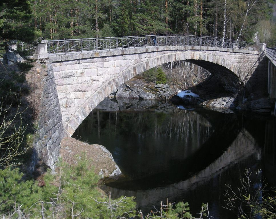 Storestraum bru mellom Byglandsfjorden og Åraksfjorden